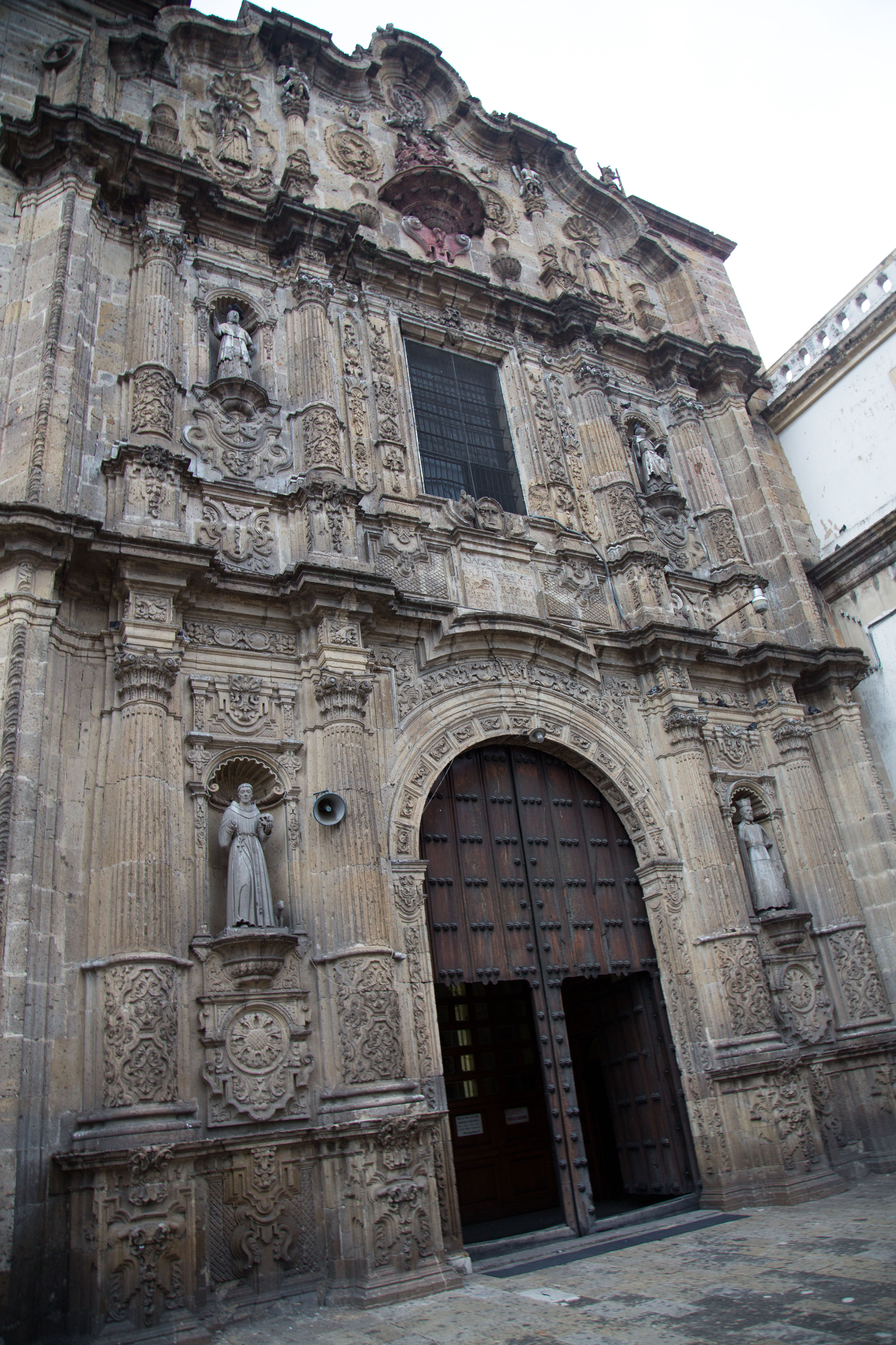 Templo de San Felipe Neri